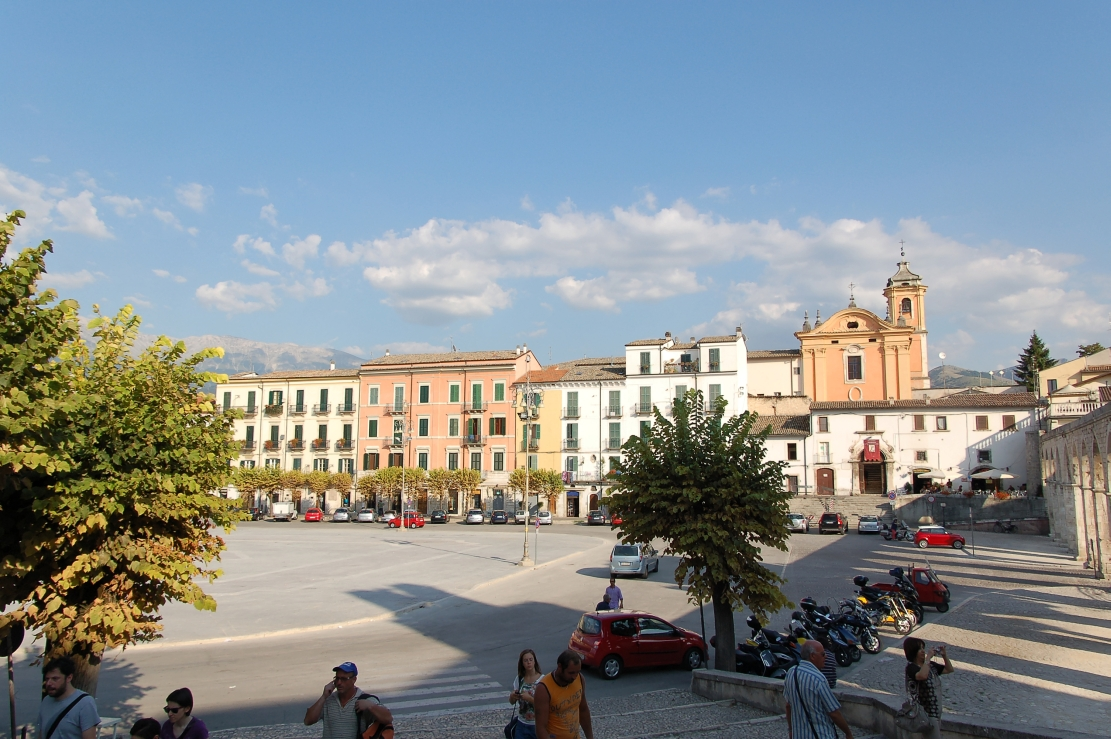 Sulmona 2011